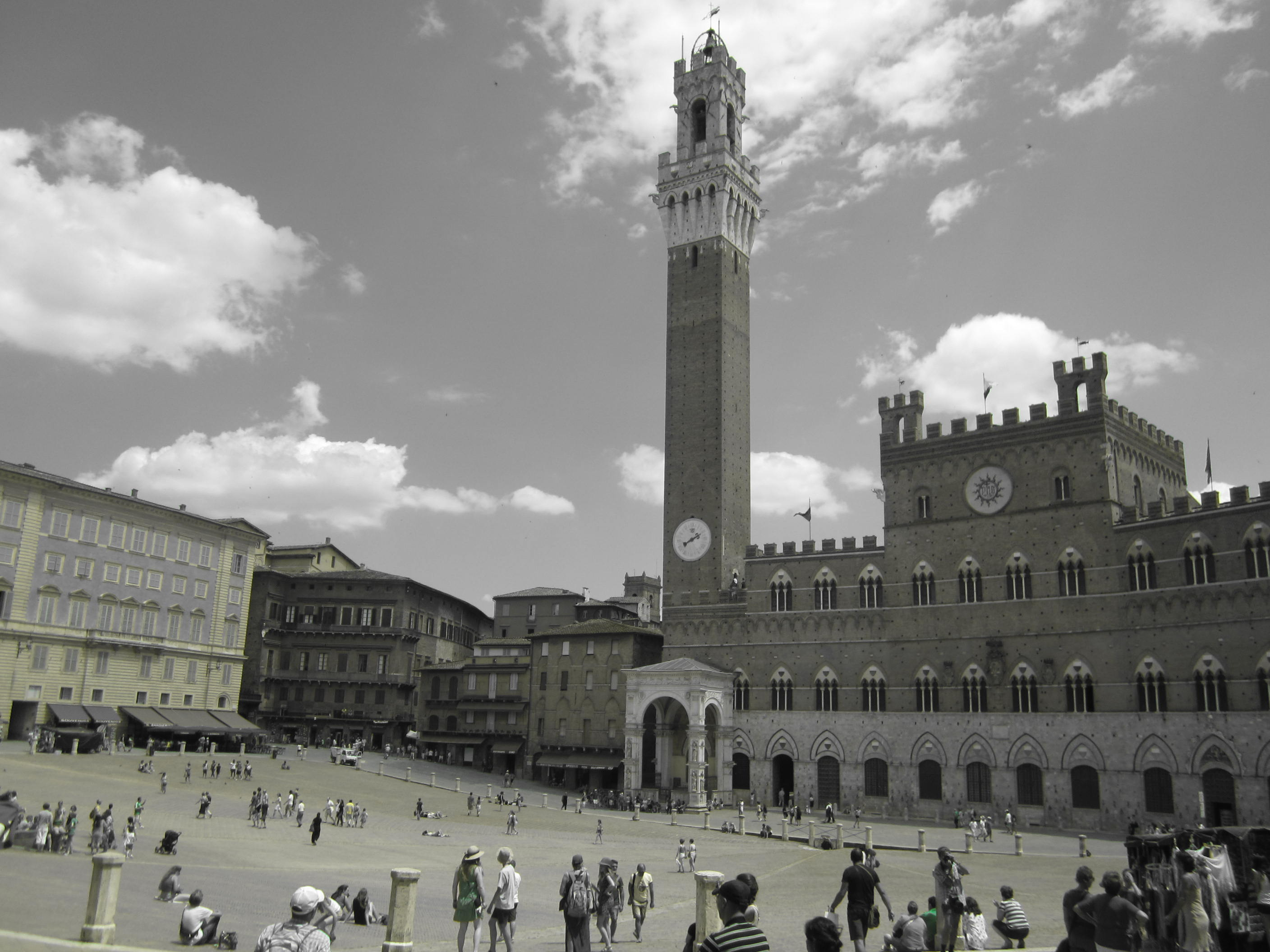 Piazza del Campo, Siena